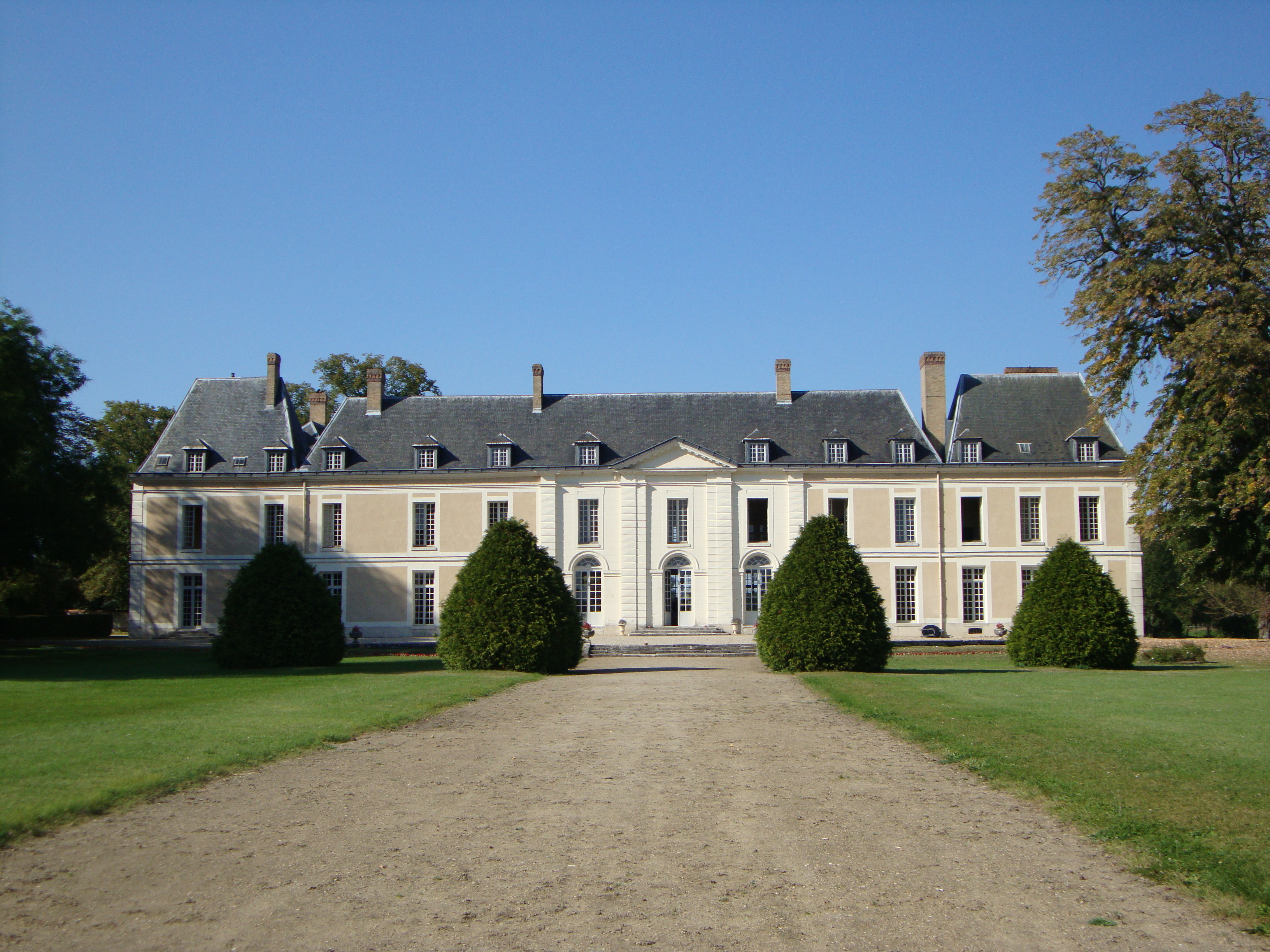 Château de Brou-sur-Chantereine - Vue de l'avant .